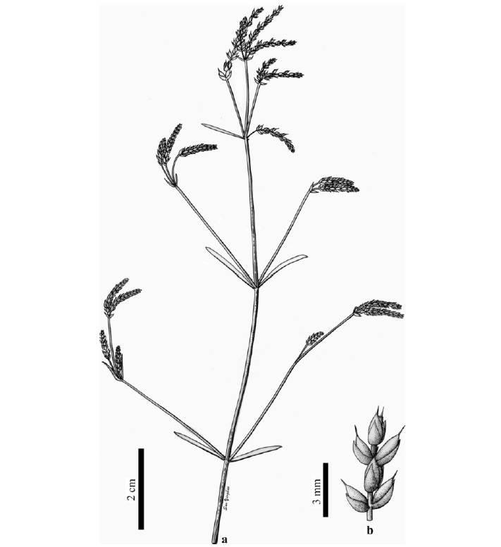 A reconstruction of Chengia laxispicata gen. et sp. nov.. (a) The general morphology of Chengia laxispicata. (b) The morphology of a partial female reproductive spike.